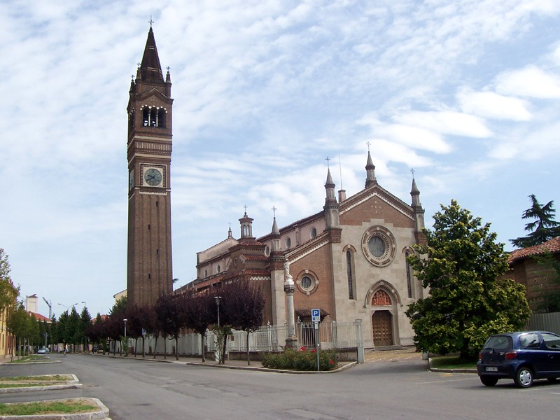 Trezzo sull'Adda - Chiesa Parrocchiale dei Ss. Gervasio e Protasio